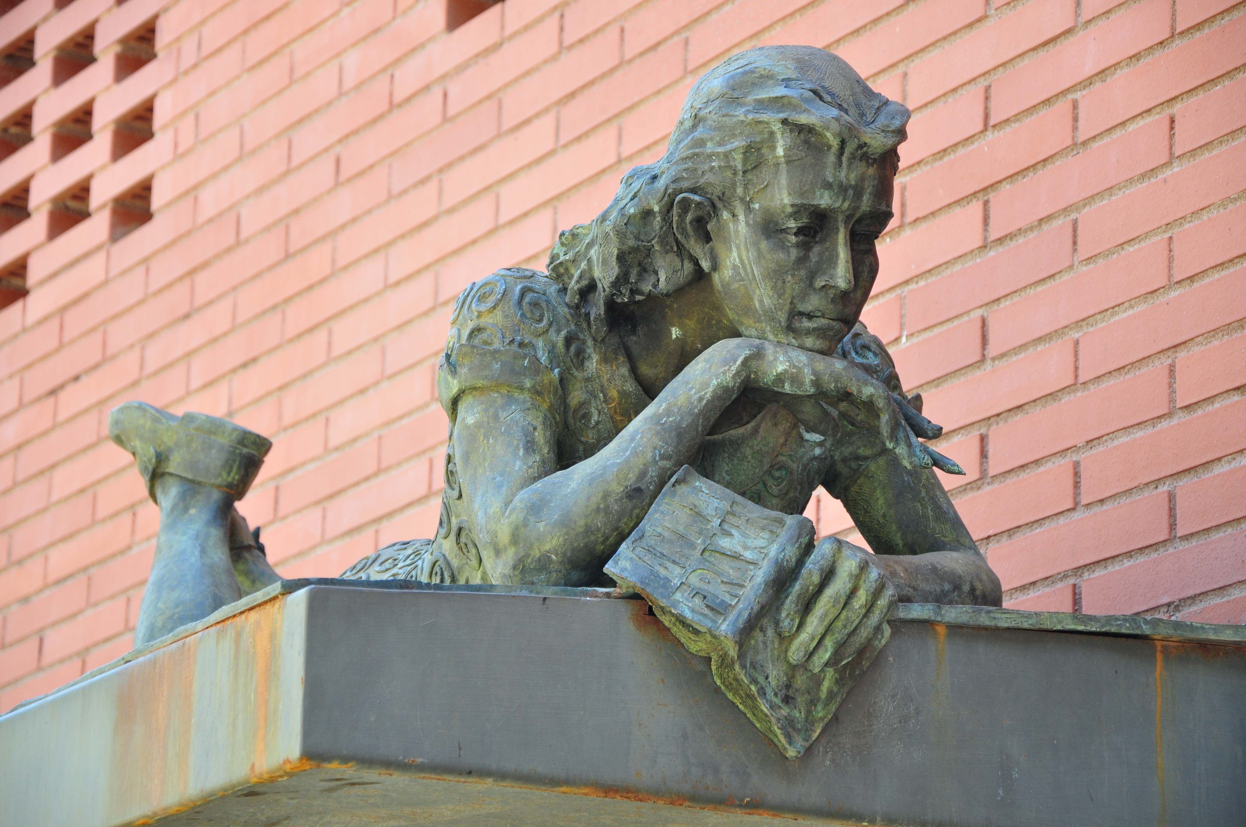 Anna Frank (Sara Pons). Pl. Anna Frank (Barcelona)